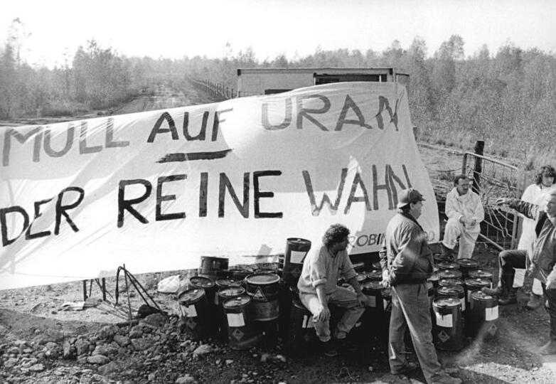 ADN- Wolfgang Kluge 25.10.90 Ronneburg: Mitglieder der Umweltschutzorganisation "Robin Wood" blockierten mit drei Lastwagen die Mülldeponie Lichtenberg auf dem ehemaligen Uranabbaugebiet der Wismut AG. Robin Wood hat reichlich Verdachtmomente dafür gesammelt, daß hier nach wie vor unkontrolliert Giftmüll abgelagert wird. Die Aktion wird bis zum 26.10 weitergeführt.